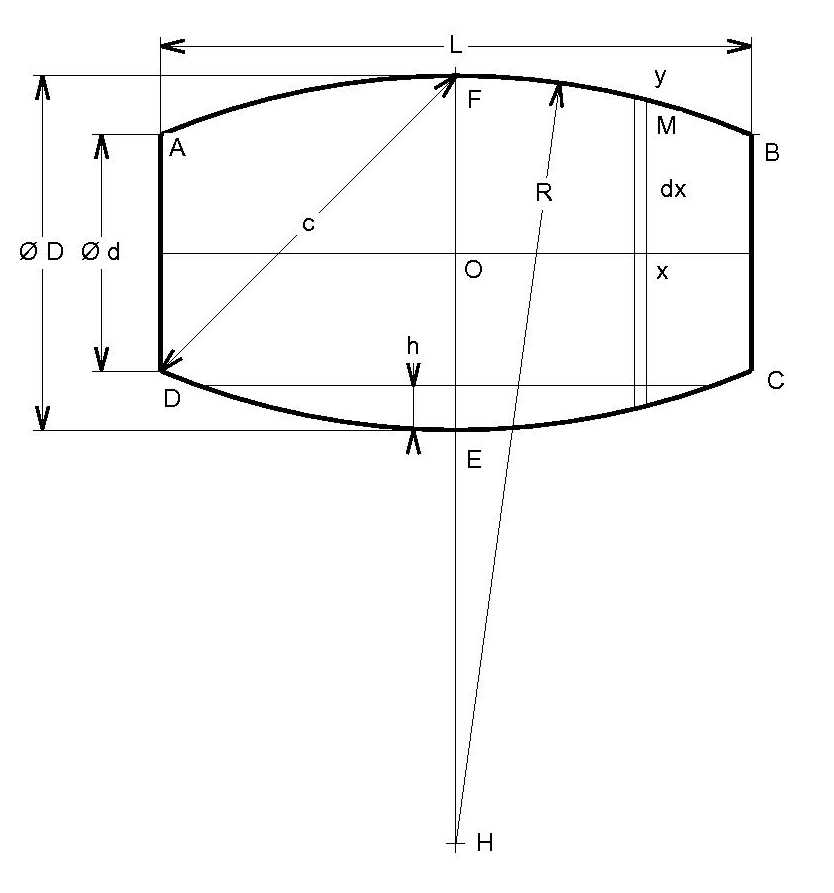 Cotes du tonneau couché